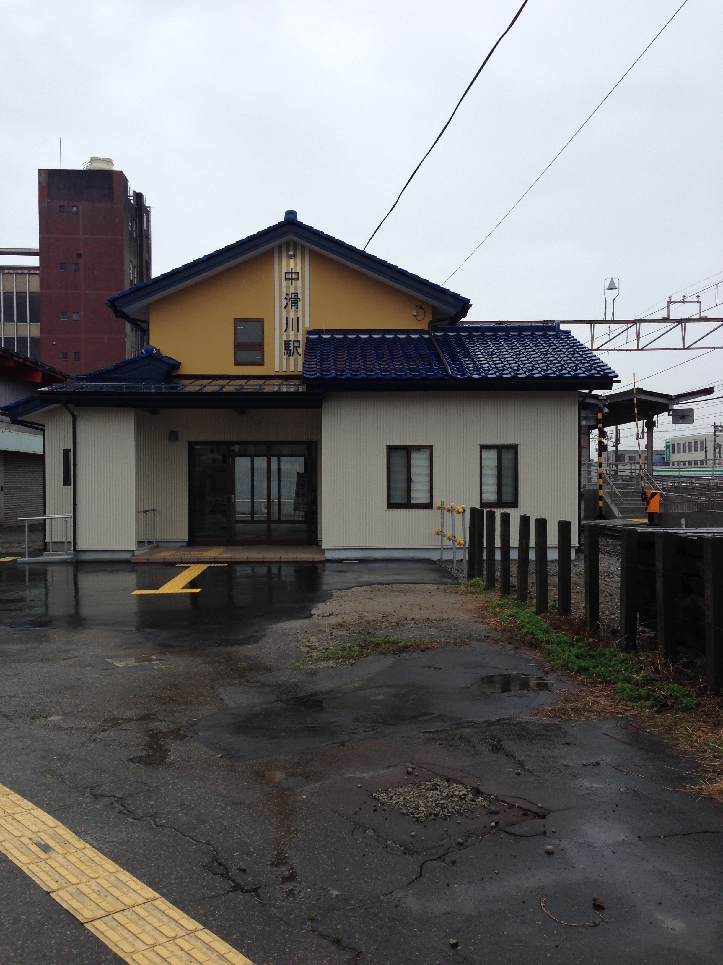 中滑川駅（新）